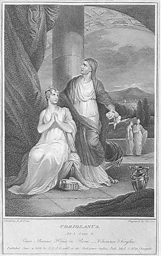 Act I, Scene 3: Volumnia praises Coriolanus